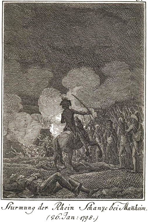 Kupferstich, Rheinschanze Mannheim, Erstürmung durch die Franzosen am 25.1.1798 (Datum des Stiches falsch)